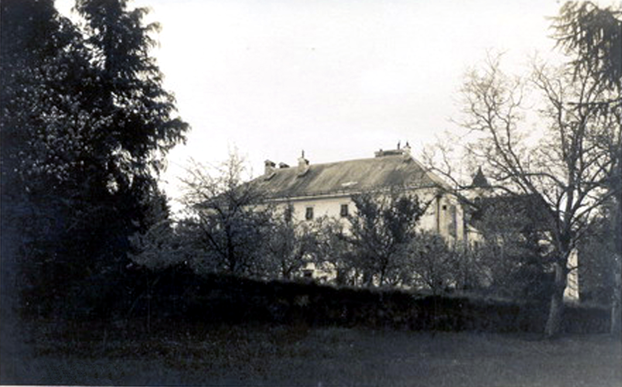 Predvojna razglednica dvorca Ruperč vrh